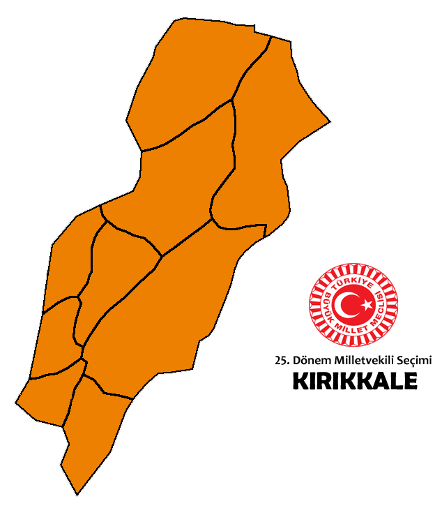 2015 genel seçim sonuçları